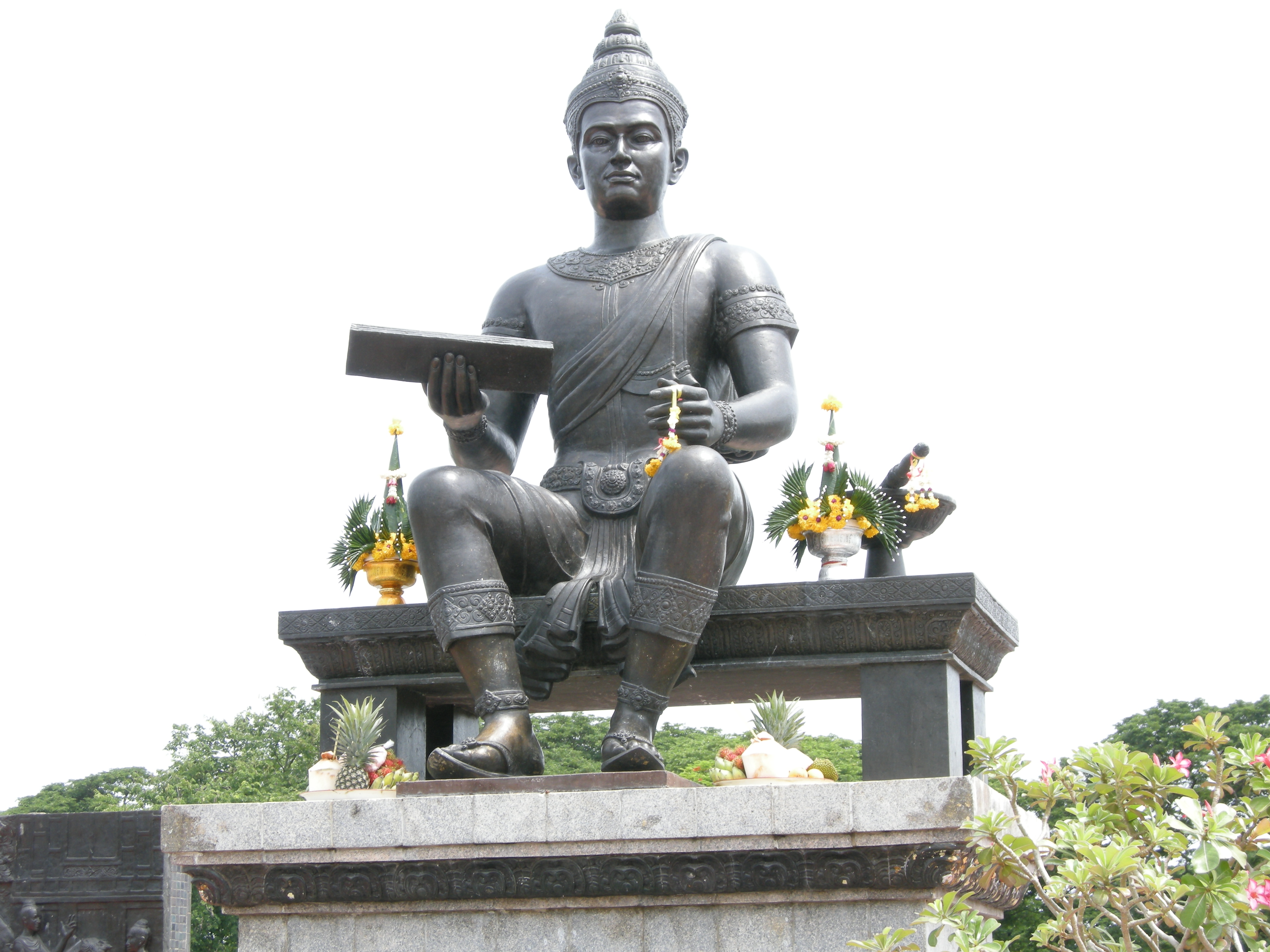 พ่อขุนรามคำแหงมหาราช (Ram Khamhaeng)攝於Sukhothai Historical Park